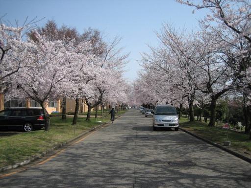 ฤดูใบไม้ผลิในมหาวิทยาลัยเทคโนโลยีนะงะโอะกะ